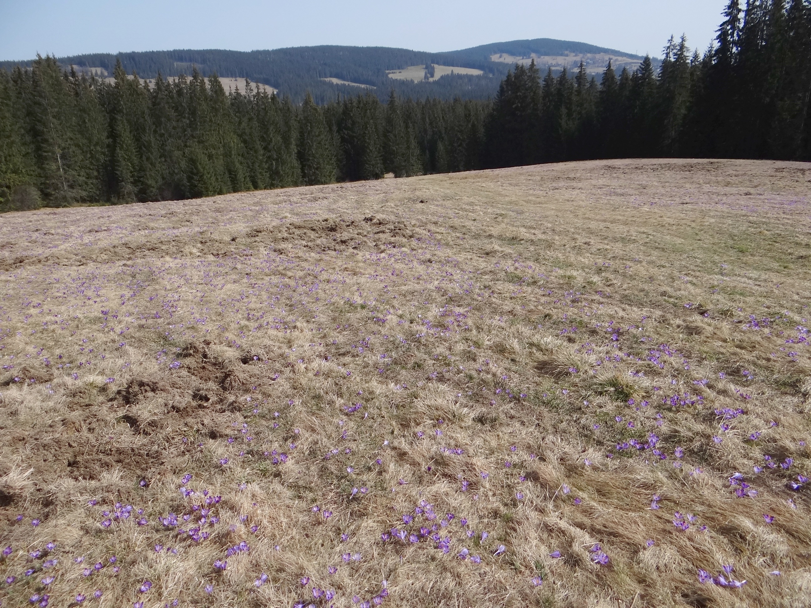 Polana Krzystkówka na Magurze Witowskiej